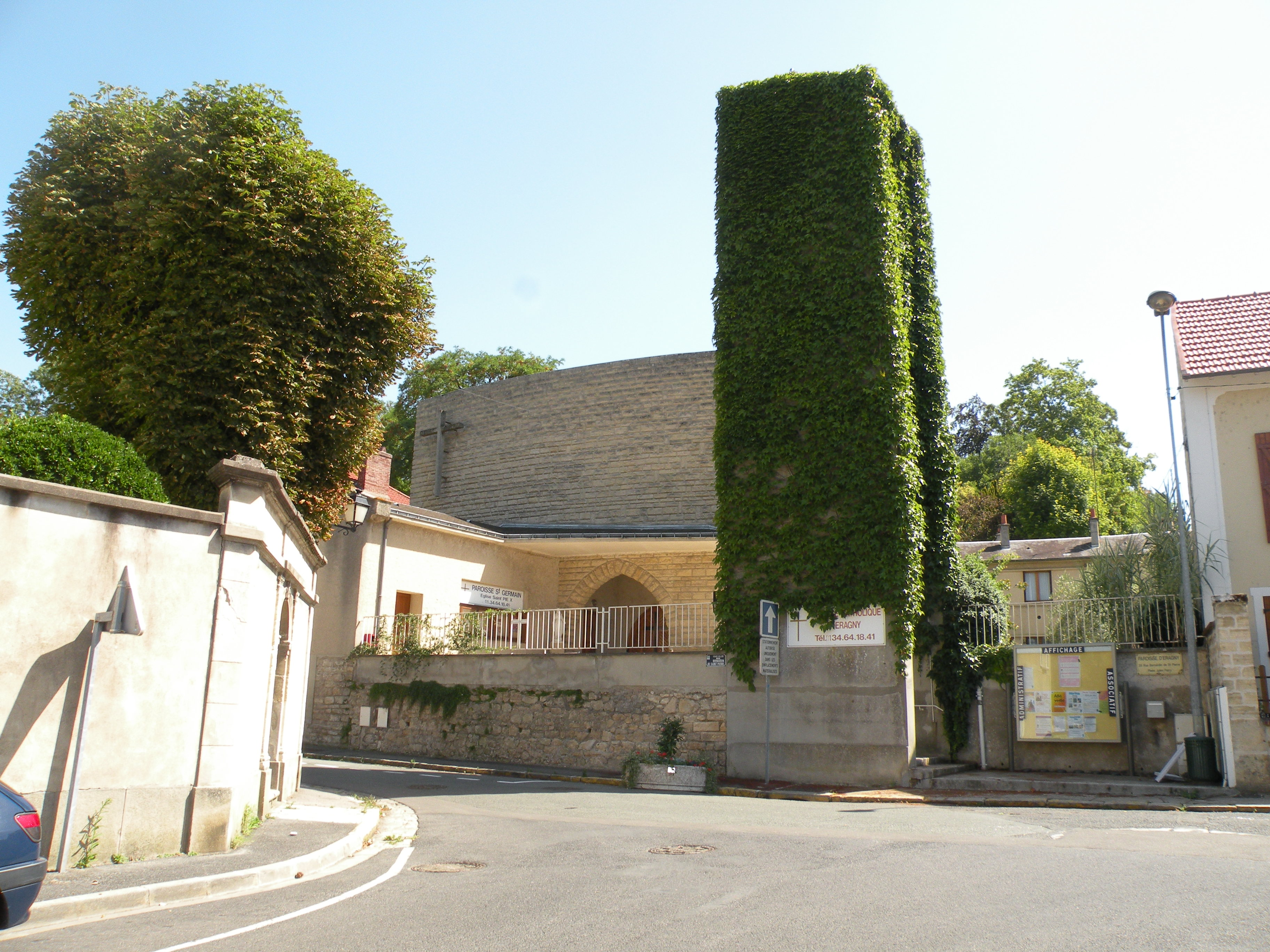 elise pie x d' Éragny-sur-Oise val d'oise france